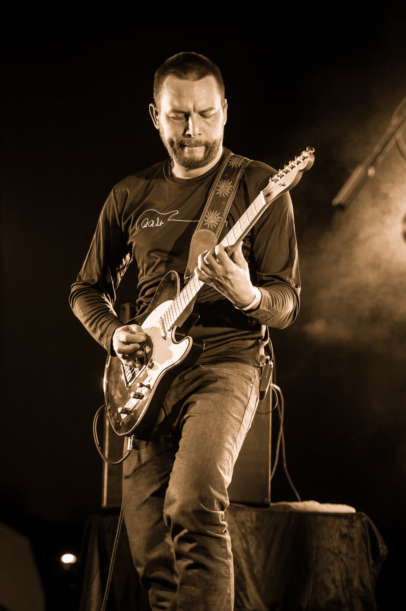 Marcin Żabiełowicz, gitarzysta zespołu Hey podczas Rocket Festiwal 2013 w Warszawie.